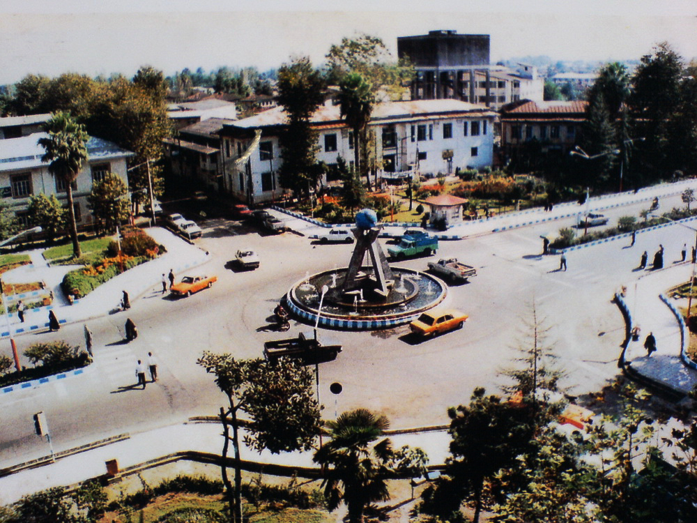 رودسر قدیم-حوالی دهه پنجاه